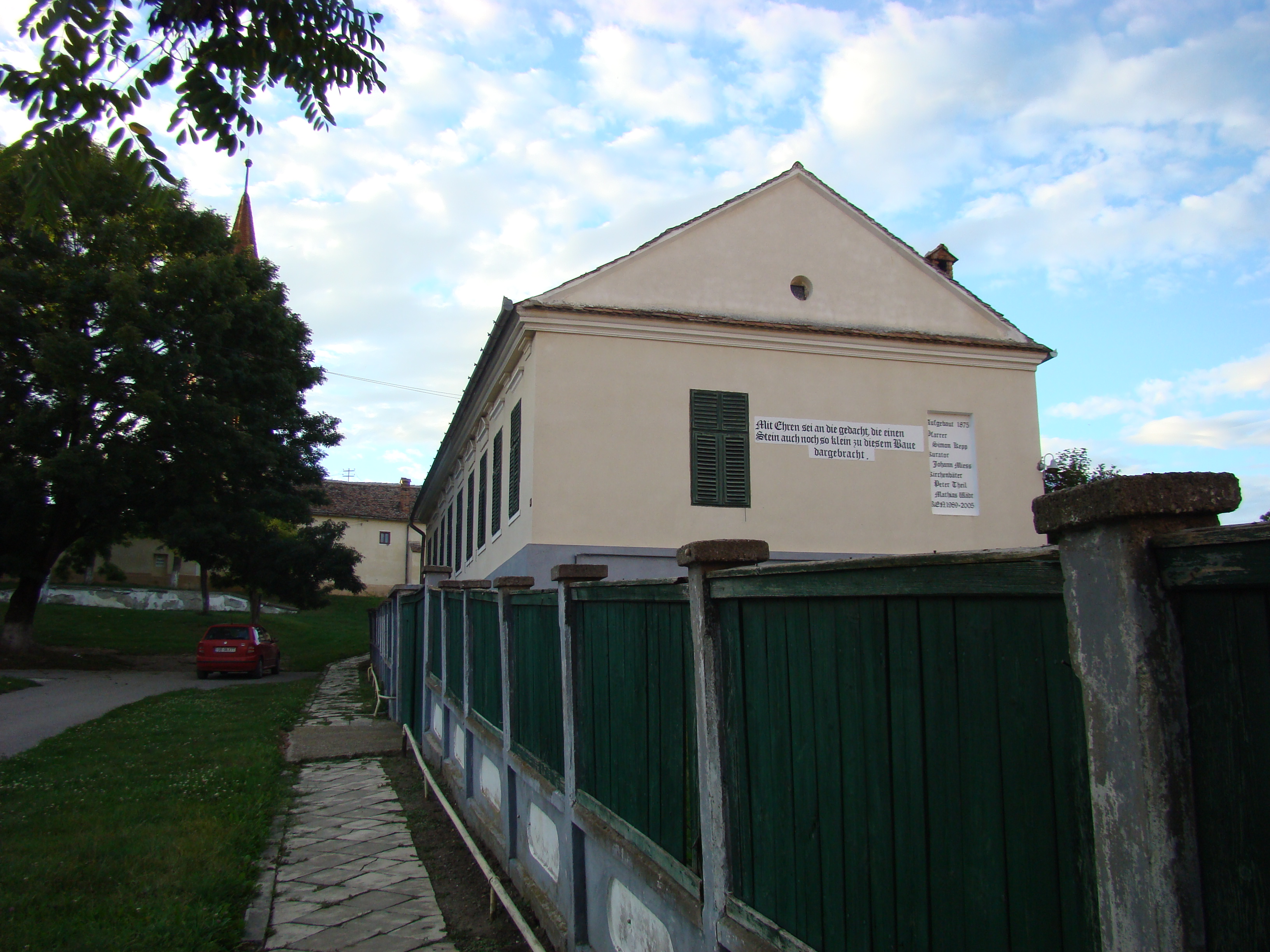 Biserica evanghelică fortificată din Șona